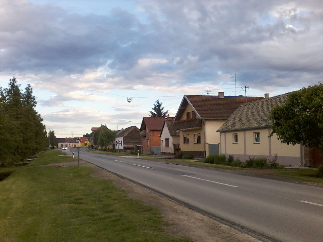 Miholjački Poreč, općina Donji Miholjac.